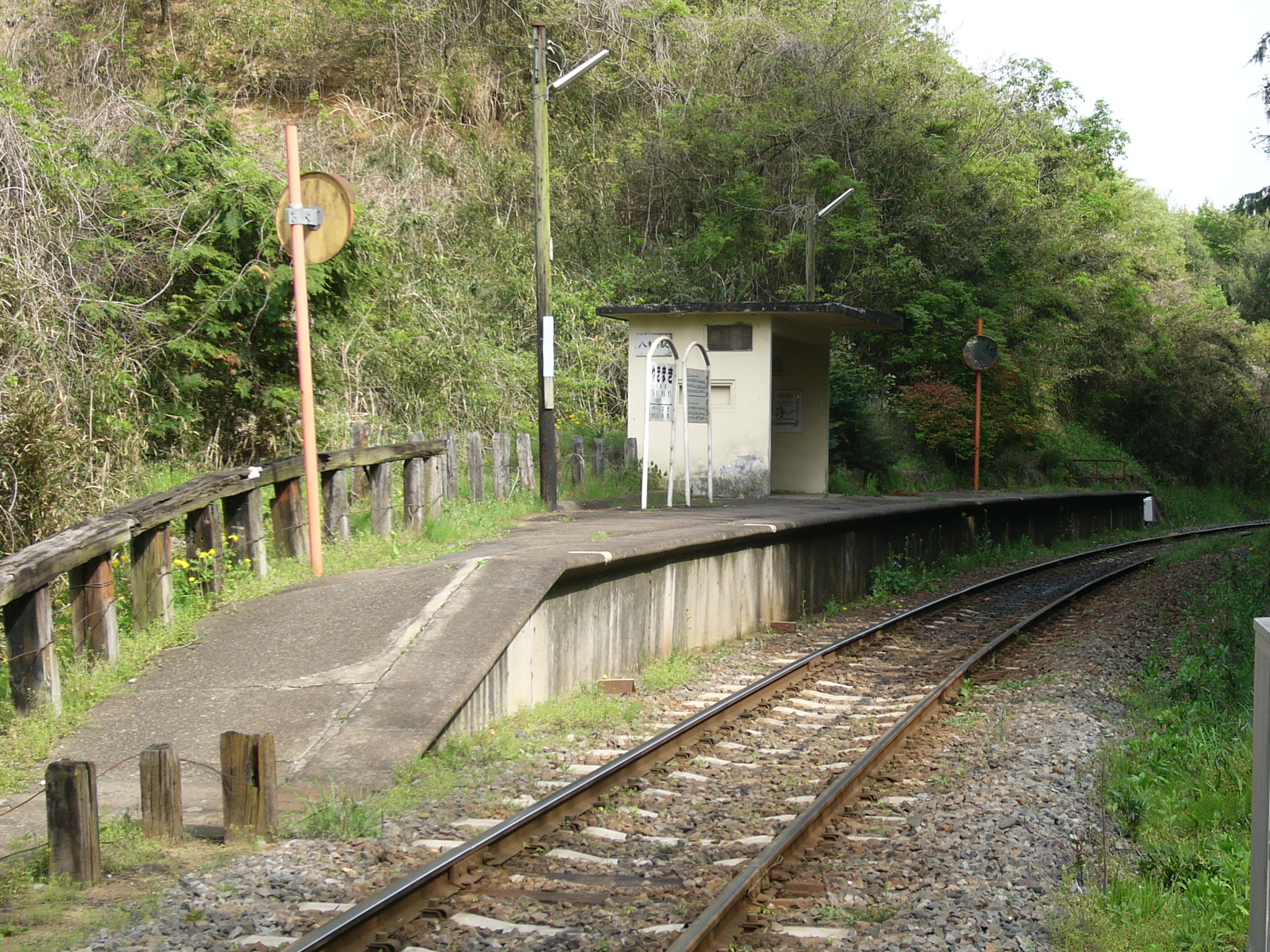 Yakimaki Station